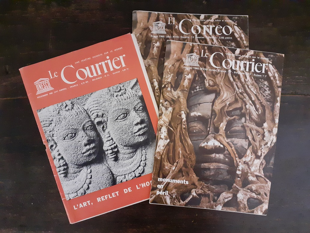 Deux couvertures avec Photo de Jean-Maurice et Françoise CART du Courrier de l'UNESCO 1962 et 1965